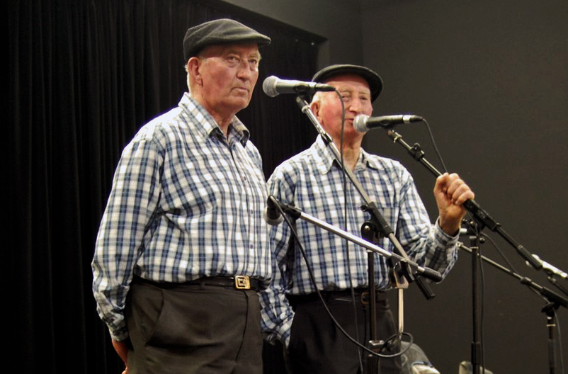 Les Frères Morvan au Fest Noz à l'Espace de l'Étang Bleu de Paimpont